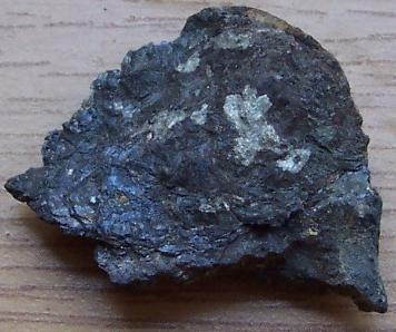 minerał; chromit, pochodzenie Albania; autor zdjęcia Sebastian Socha; 05.08.2006r.